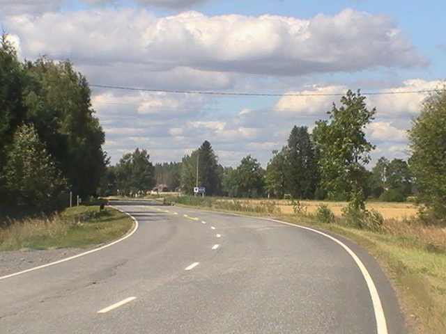 Yhdystie 2140 Säkylässä Köyliön rajan läheisyydessä.